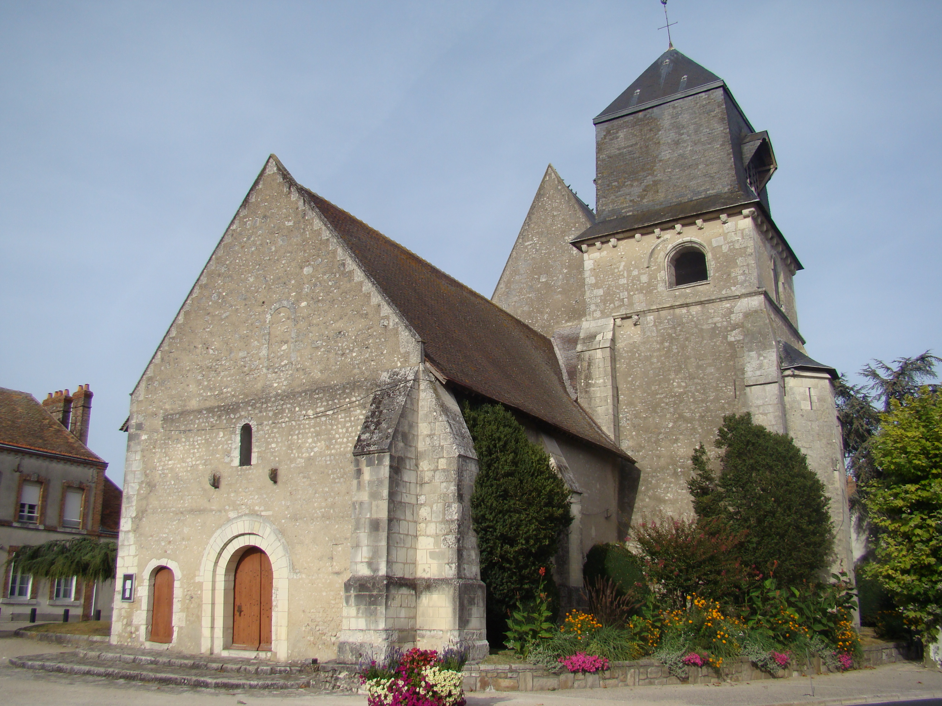 Eglise Saint-Pierre